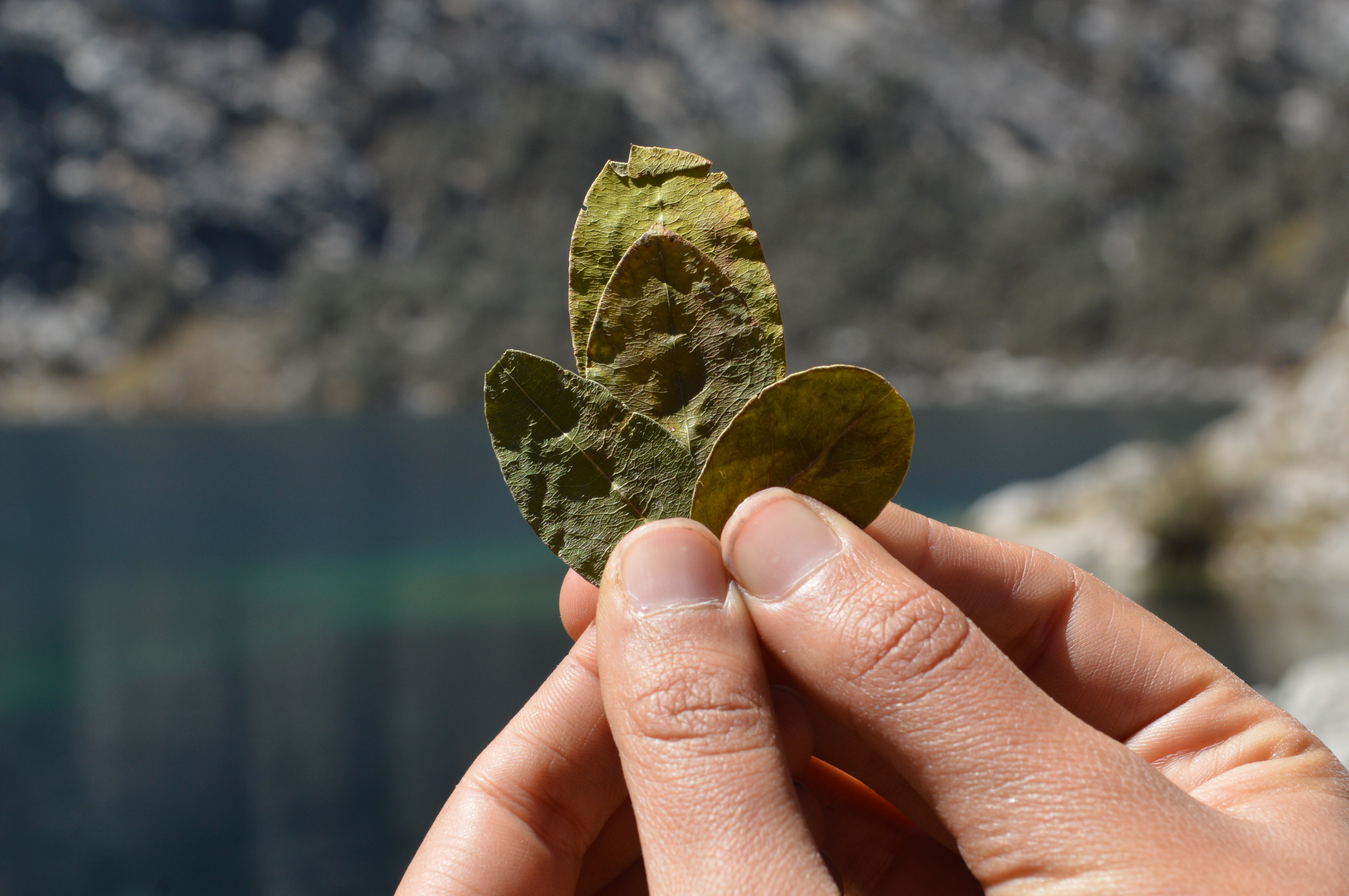 Cocakintu de 4 hojas en la laguna Churup, distrito de Independencia, Cordillera Blanca, Perú.